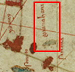 Guanahani (San Salvador - first string of islets discovered by Columbus in 1492) - Label and islets marked within the red box